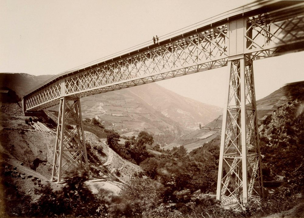 Fotografía incluida en el álbum Inauguración de la línea de Asturias, 15 de agosto de 1884: Ferro-carriles de Asturias, Galicia y León", de 24 fotografías. Esta muestra el desaparecido viaducto de Parana, en la cercanías de Puente Los Fierros